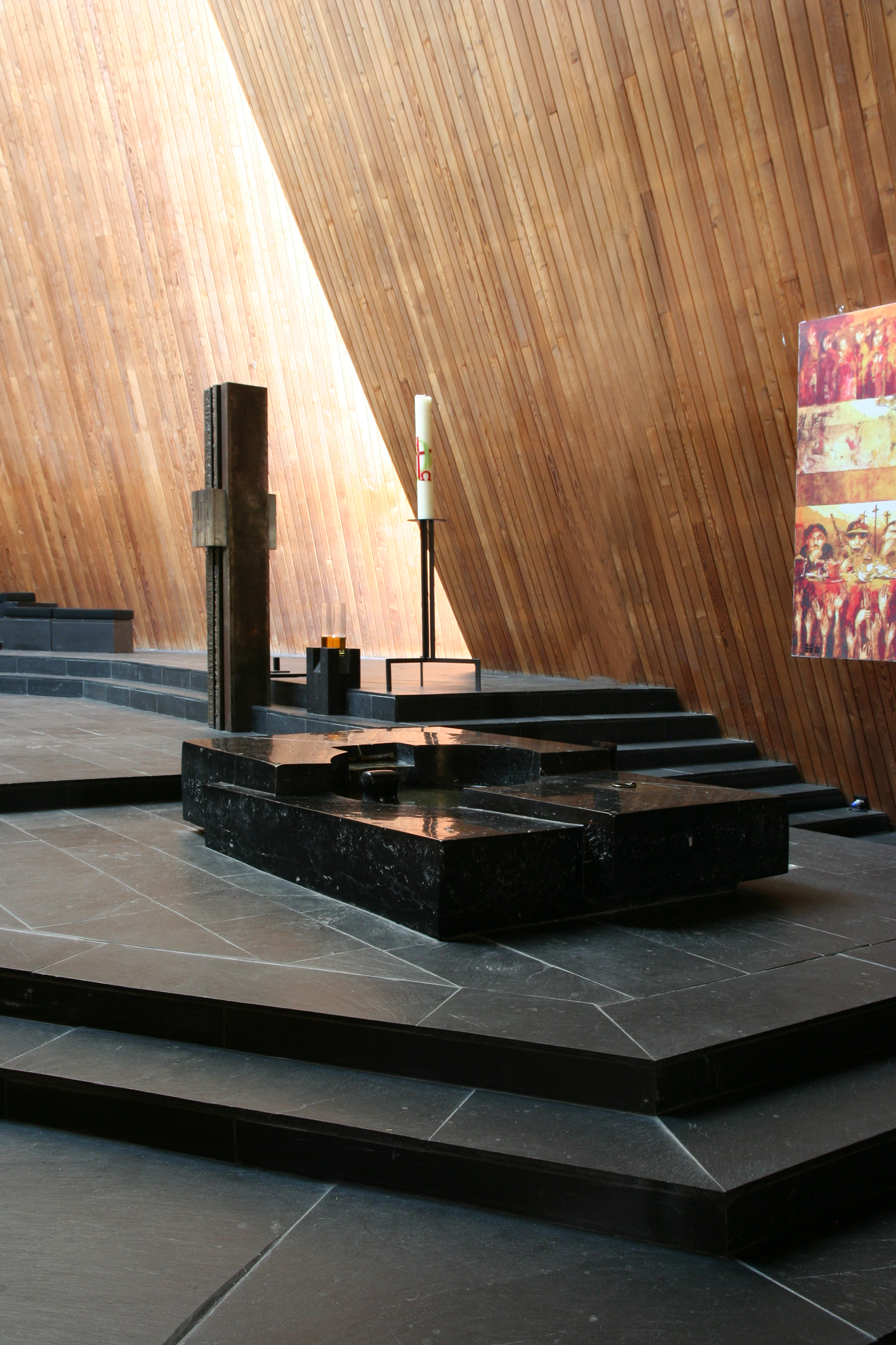 Römisch-katholische Pfarrkirche Maria Krönung Zürich-Witikon, Architektur von Justus Dahinden, Altarraum von Georg Malin